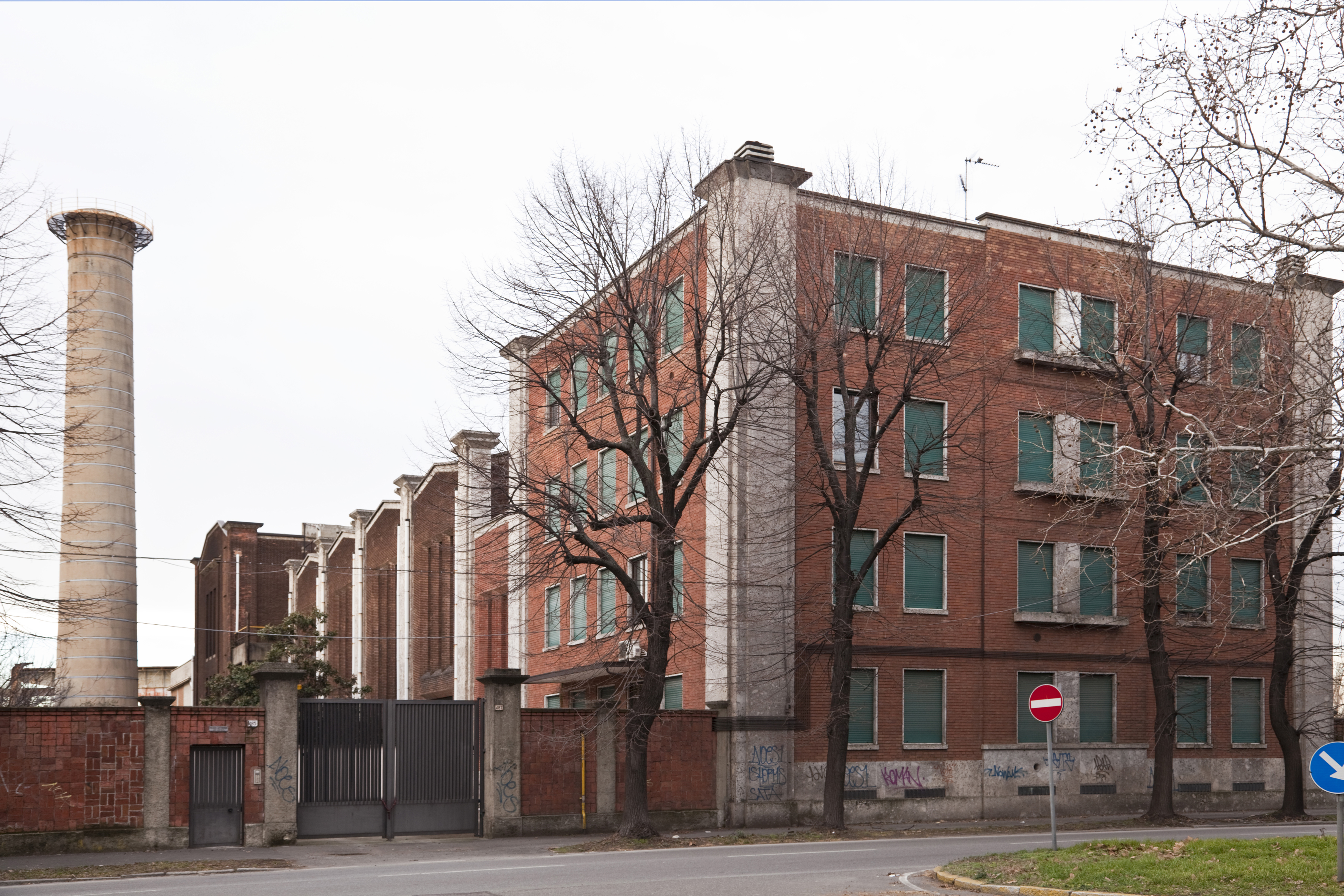 Edificio che ospitava la centrale termica che generava calore alle acciaierie falck situato nel comune di Sesto S. Giovanni This is a photo of a monument which is part of cultural heritage of Italy.